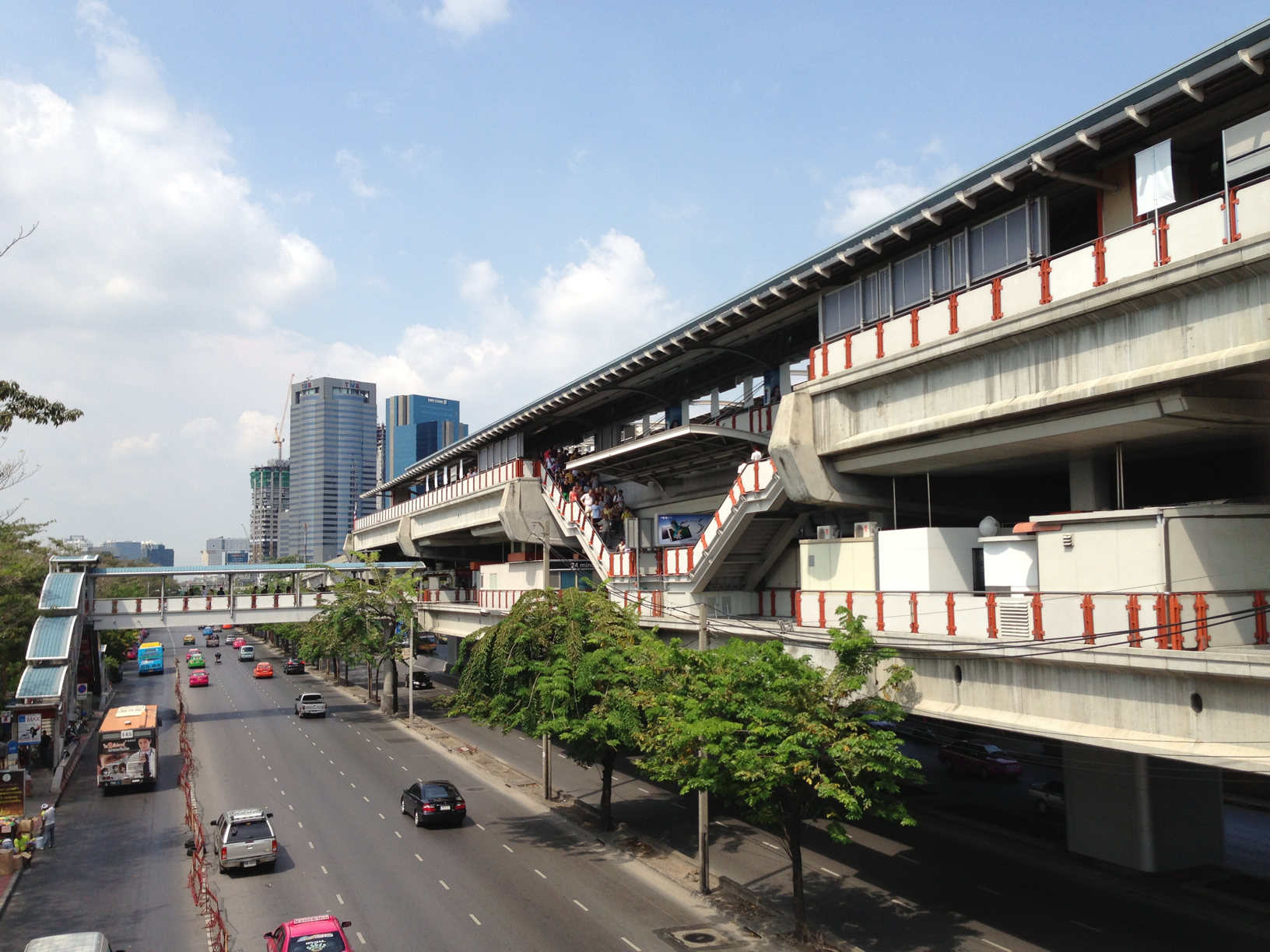 Phahonyothin Road, Chatuchak, bangkok, thailand